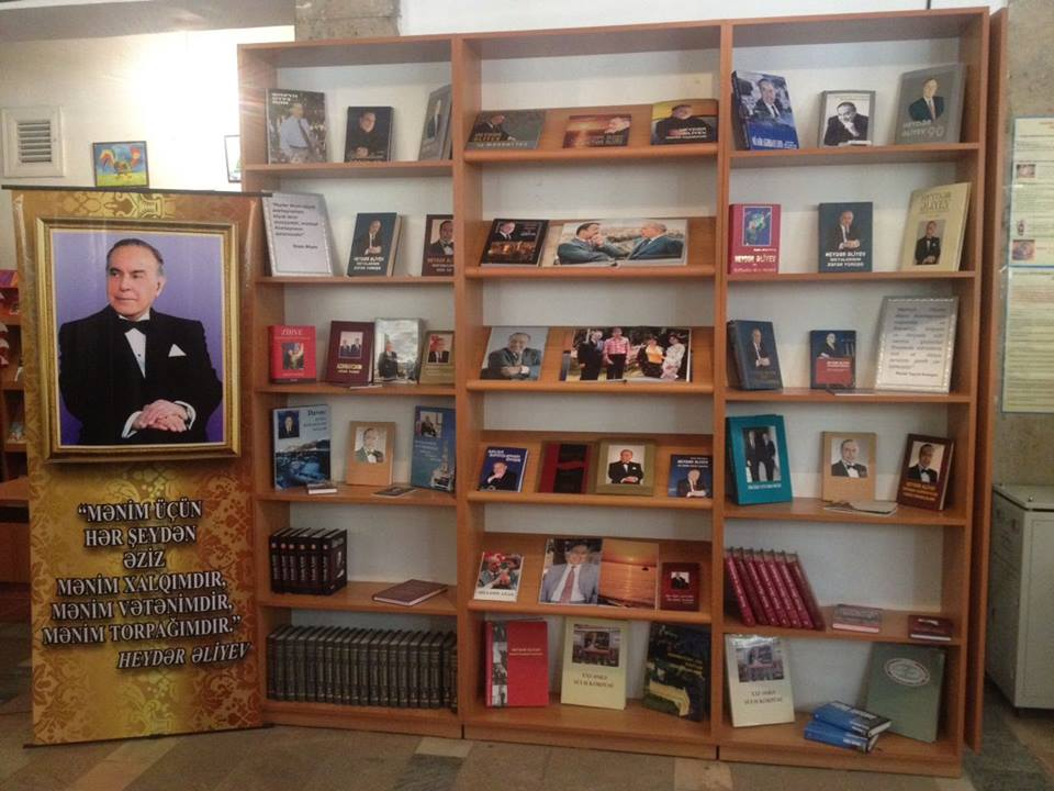 Binəqədi rayon MKS-nin Mərkəzi Kitabxanası